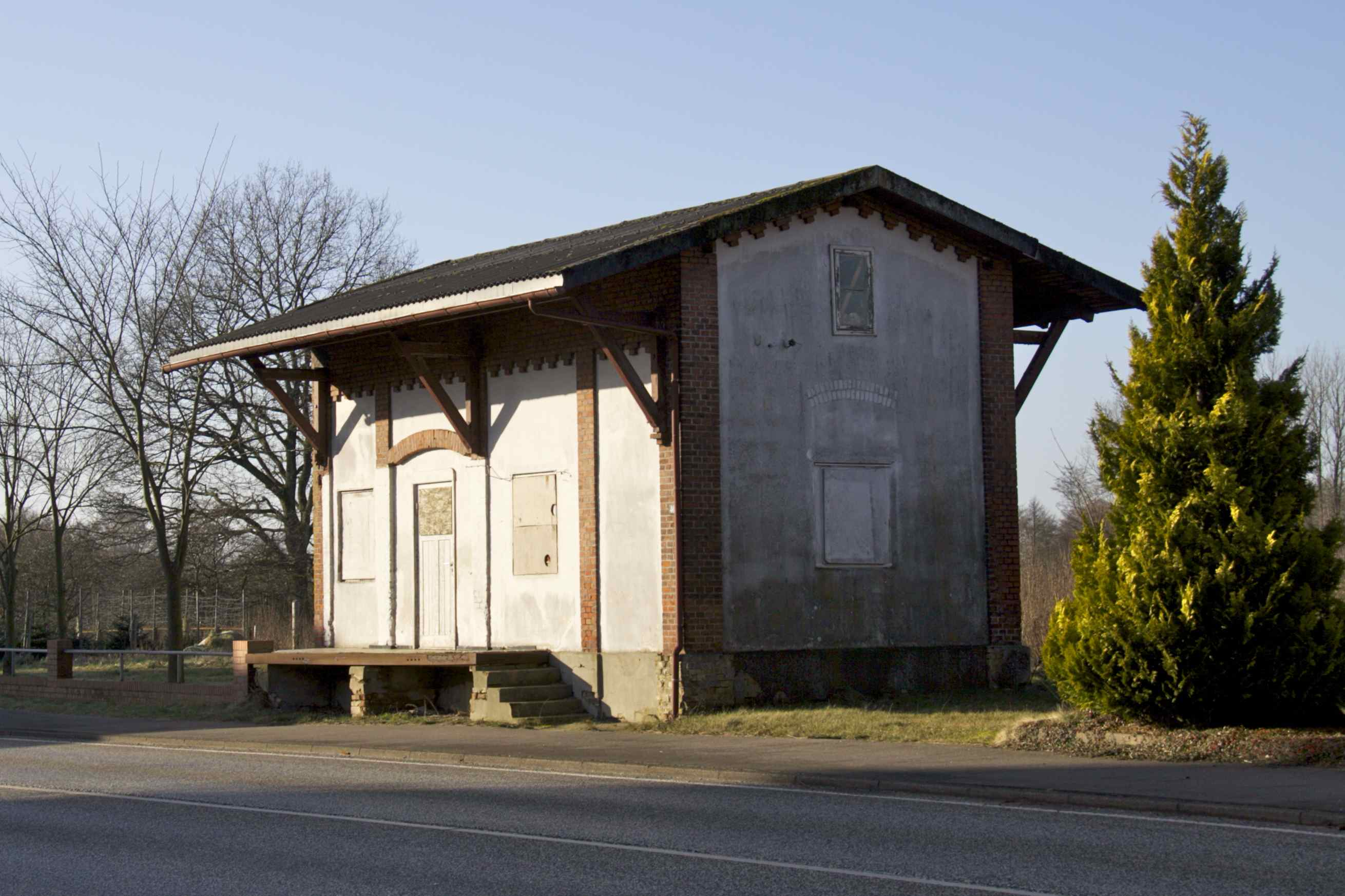 ehemaliger Güterschuppen in Tellingstedt